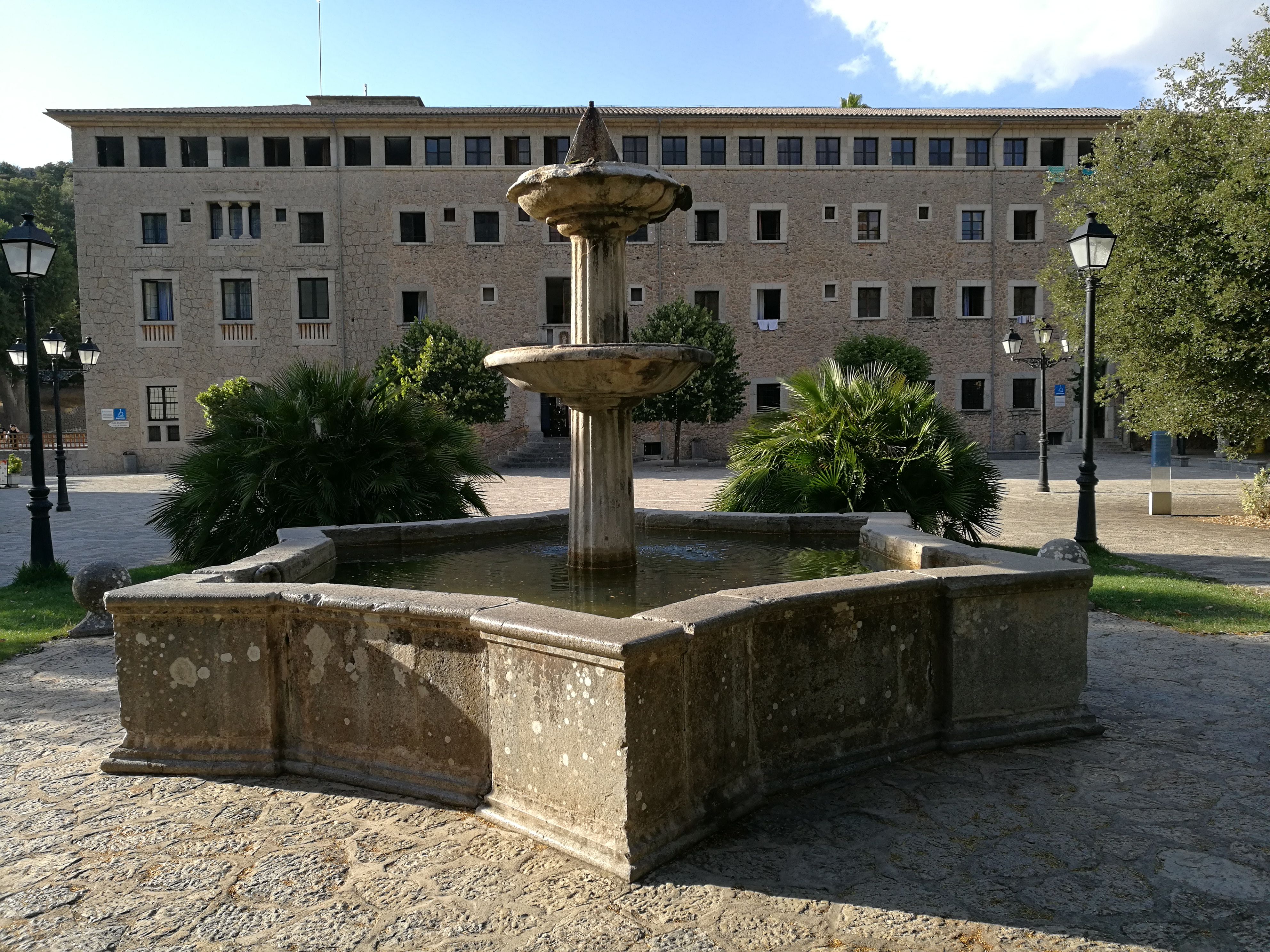 Ancienne fontaine pour les animaux, Monastère de Lluc, île de Mayorque, aux Baléares. Juillet 2018.